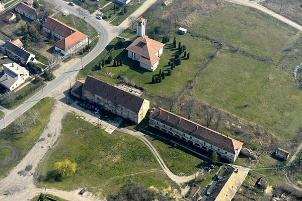 Ikrényi légi fotó